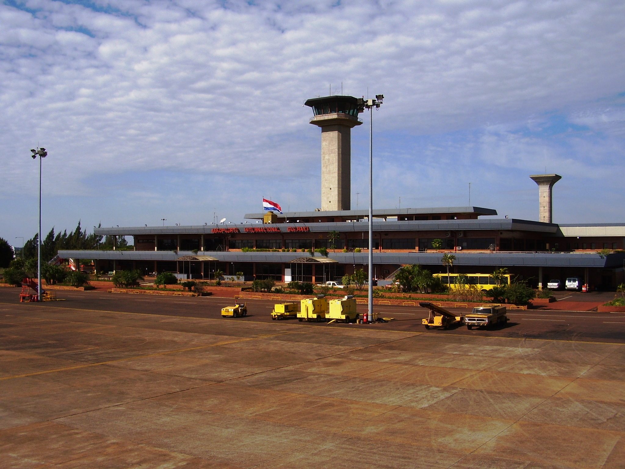 Aeropuerto Internacional Guaraní - Minga Guazú